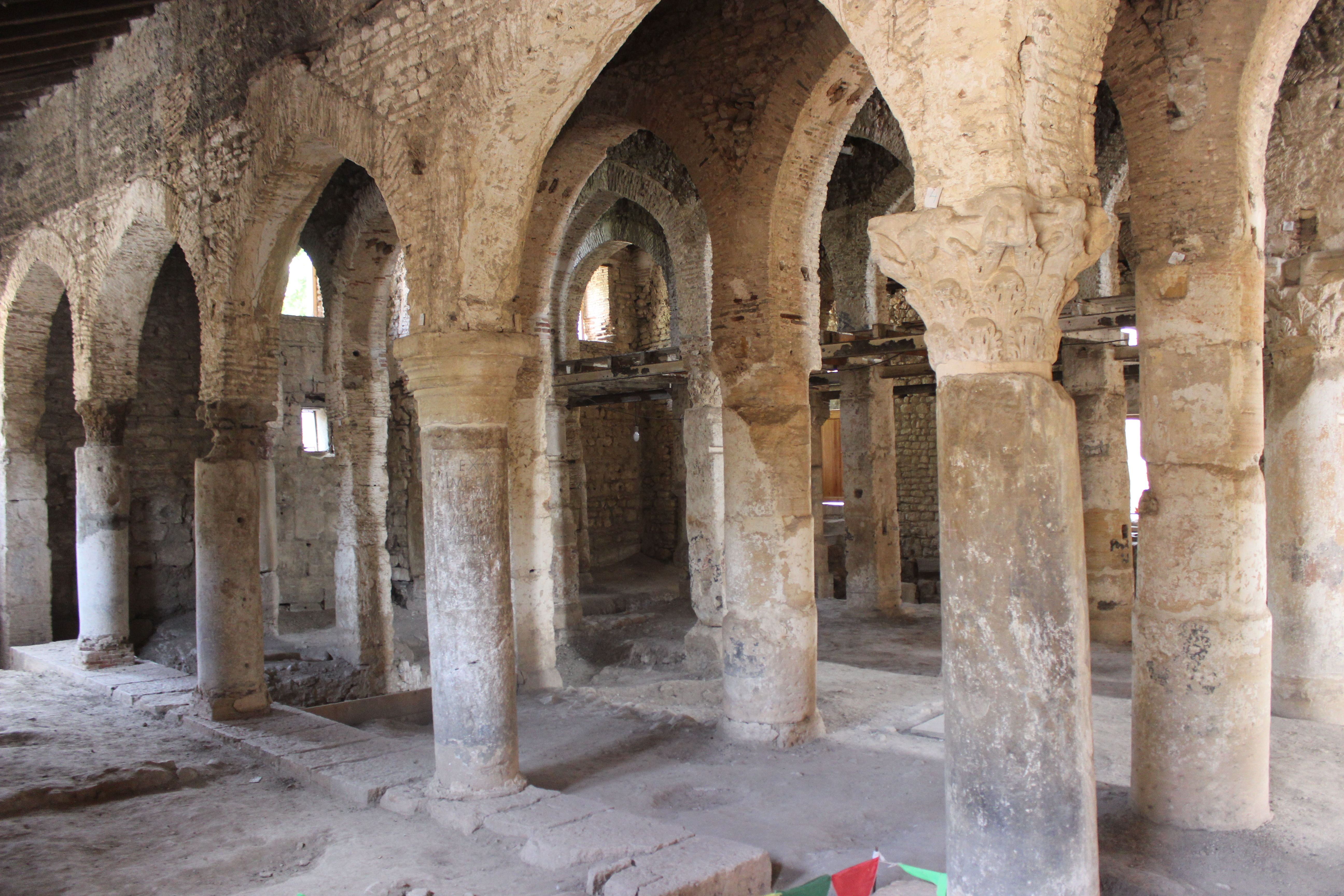 أول مسجد فالجزائر و الثاني في إفريقيا بعد القيروان